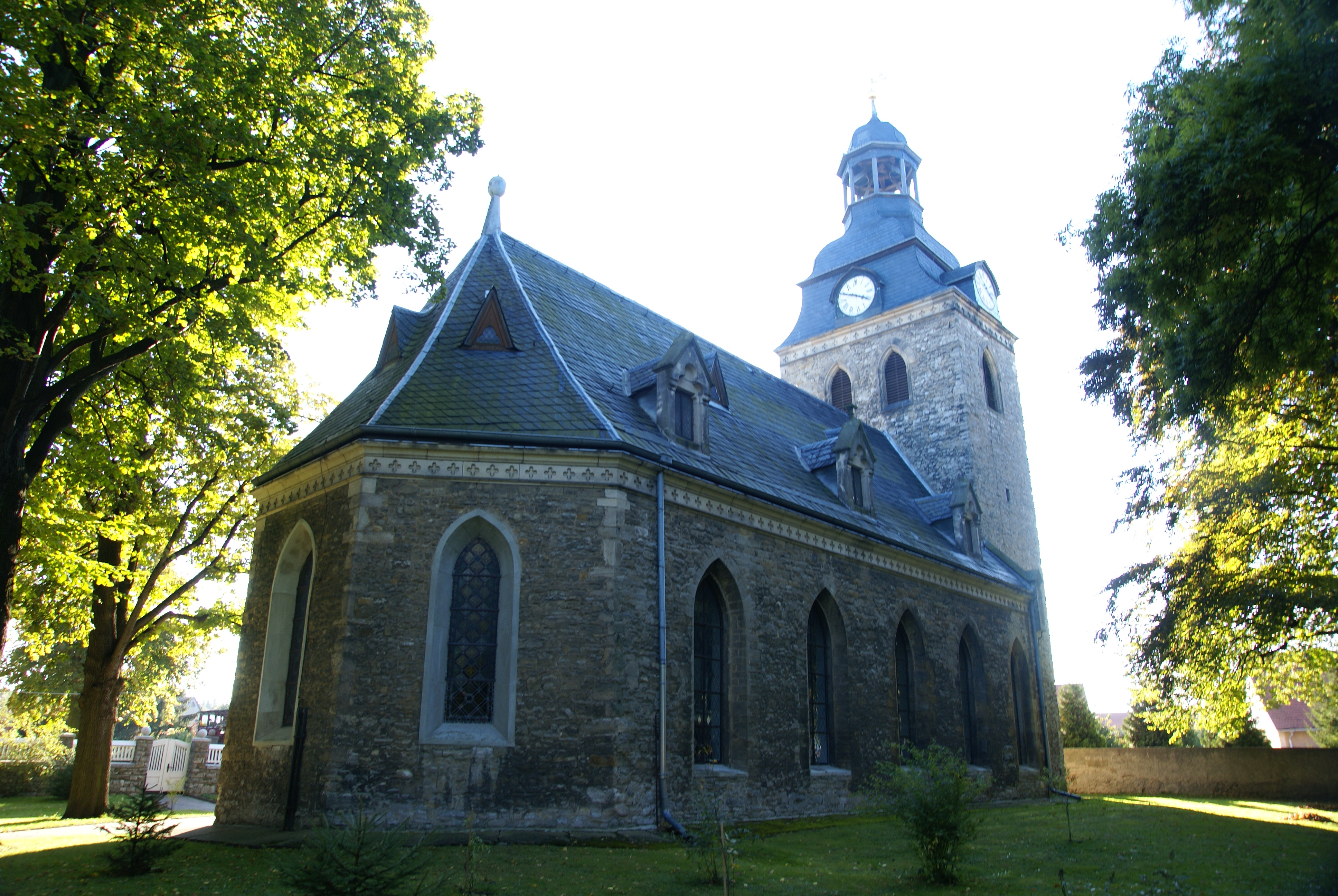 Die Dorfkirche von Quenstedt im Landkreis Mansfeld-Südharz